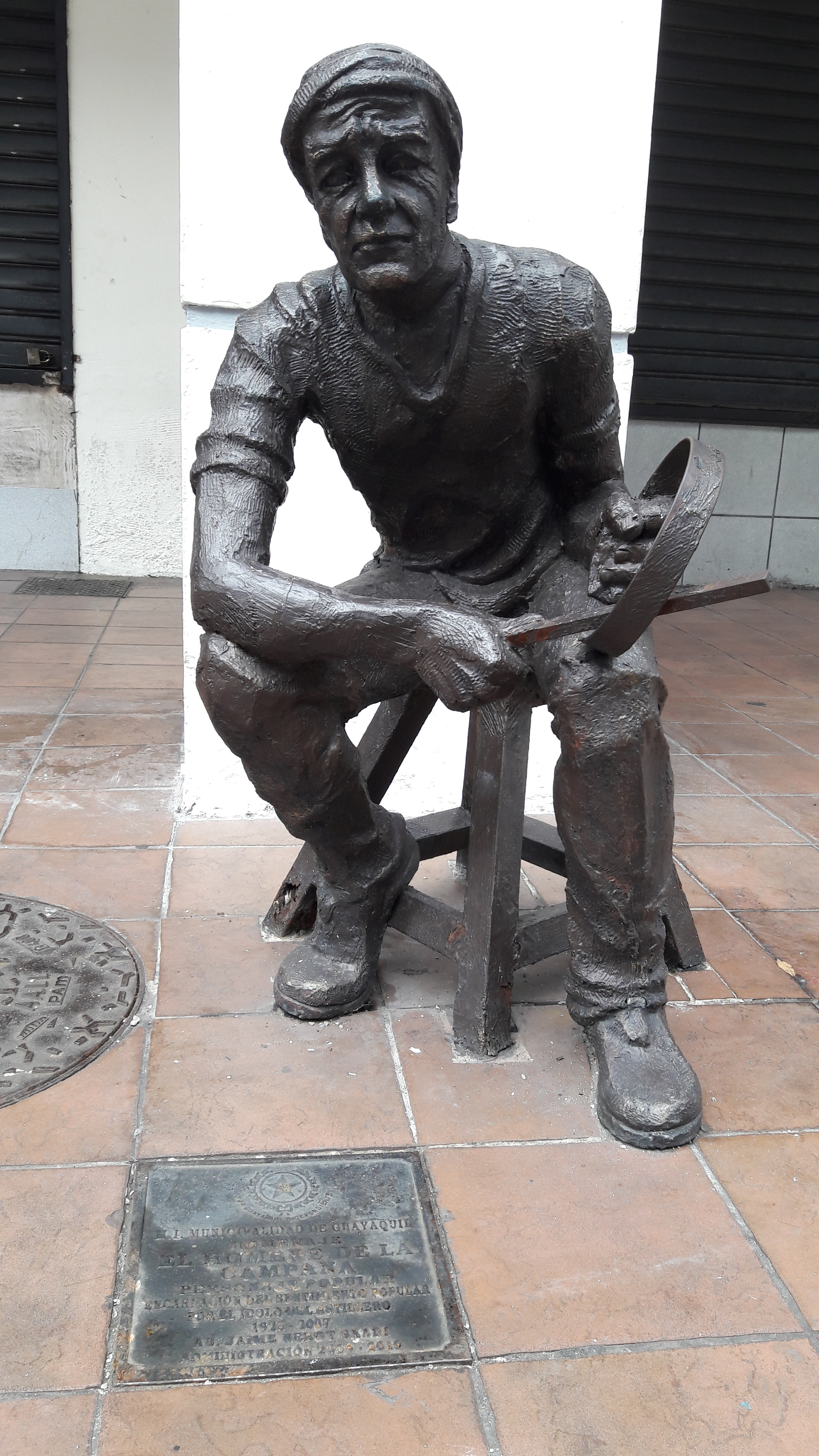 Monumentos